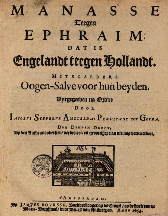 Titelblad van "Manasse teegen Ephraim door Jacobus Sceperus (1607-1677)